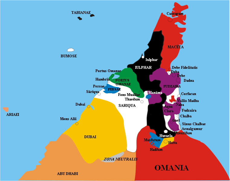 Emiratus parvi Emiratuum Coniunctorum Araborum Latine